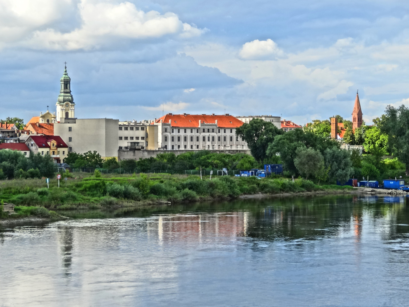 Widok Starego Fordonu (dzielnicy Bydgoszczy) od strony Wisły, widoczny m.in. kościół św. Mikołaja